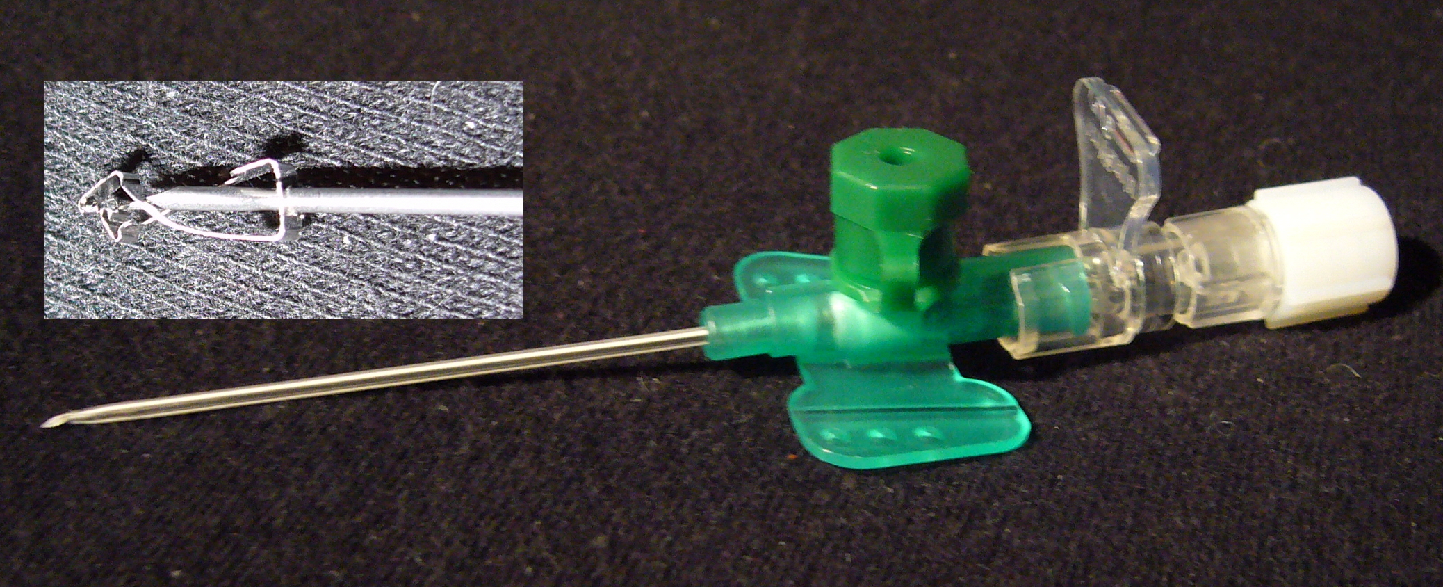 Cannula with safety features / Sicherheitskanüle von B.Braun